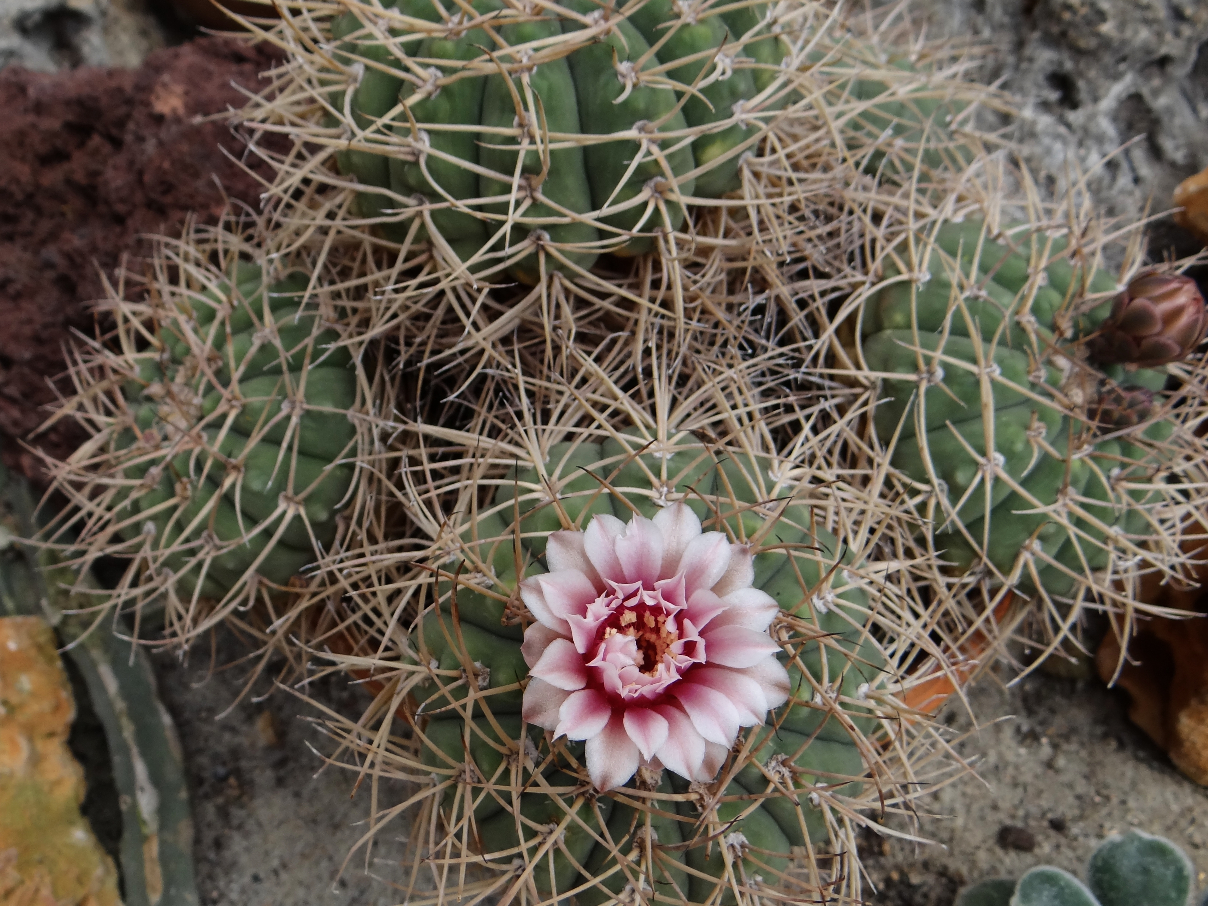 Gymnocalycium spegazzinii subsp. cardenasianum (location:Botanical Garden in Cracow)